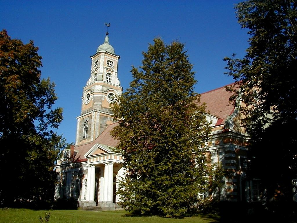 Alūksnes luterāņu baznīca 2000-09-14